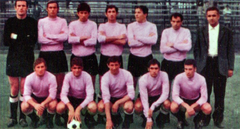 A line-up of A.C. Legnano in the 1968–69 season. From left to right, standing: Castellazzi, O. Lesca, Marella, Gorrino, N. Ulivieri, R. Talarini, S. Realini (coach); crouched: Cappellazzo, Gerosa, Lamera (captain), R. Melgrati, V. Proietti Farinelli.